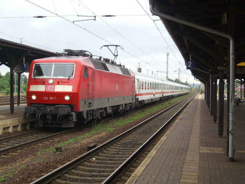 Umgeleiteter IntrCity in Leinefelde